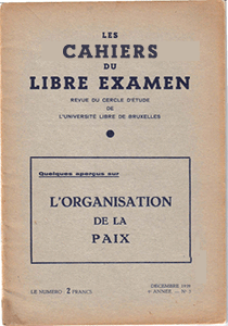 L'Organisation de la Paix - Cercle du Libre Examen - Cahiers du Libre Examen - Université libre de Bruxelles - 1939